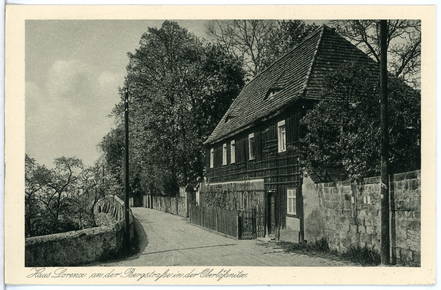 Radebeul; Haus Lorenz an der Bergstraße, Oberlößnitz This postcard is from publisher Brück & Sohn in Meißen ( postcard has a unique number 23084 and is available in a higher resolution at the publisher. This images was uploaded in a cooperation project between Wikipedians and the publisher.